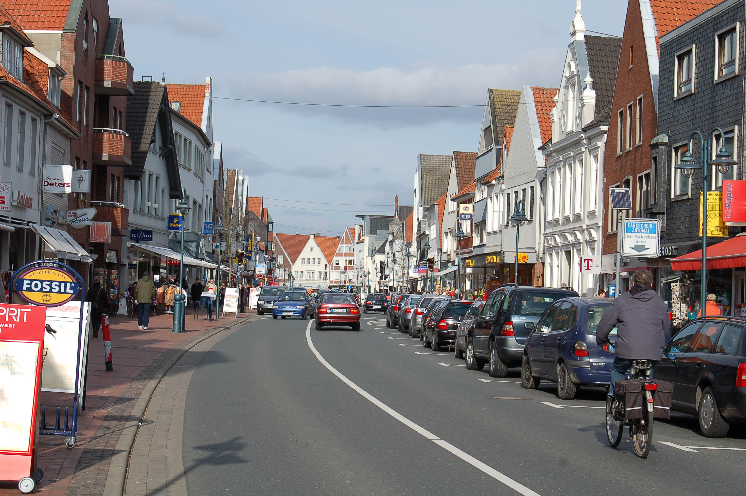 Vechta Zentrum